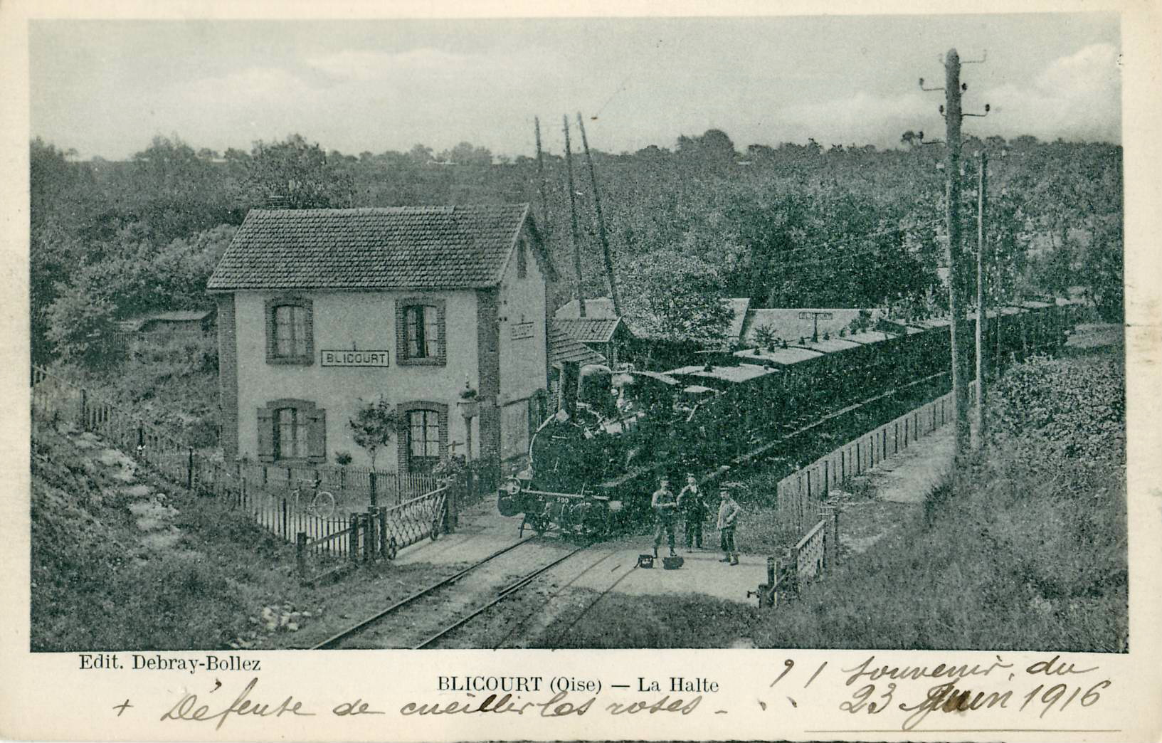 Carte postale ancienne éditée par Debray-Bollez Blicourt (Oise) : La Halte